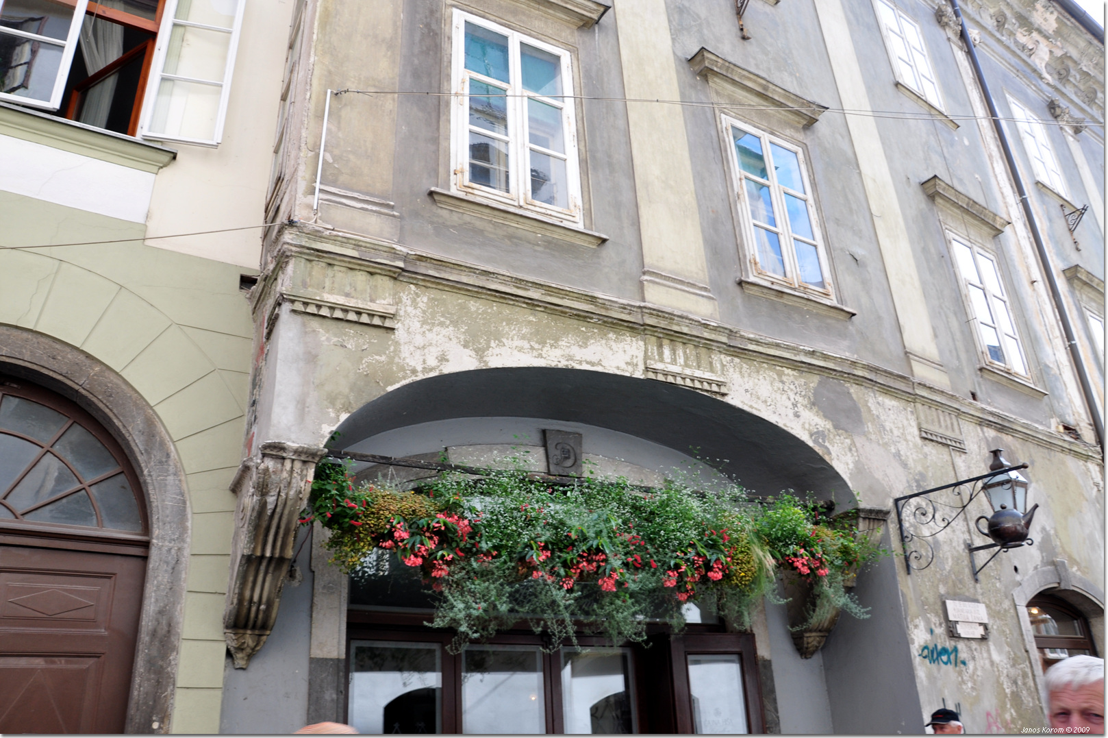 Ljubljana (244)